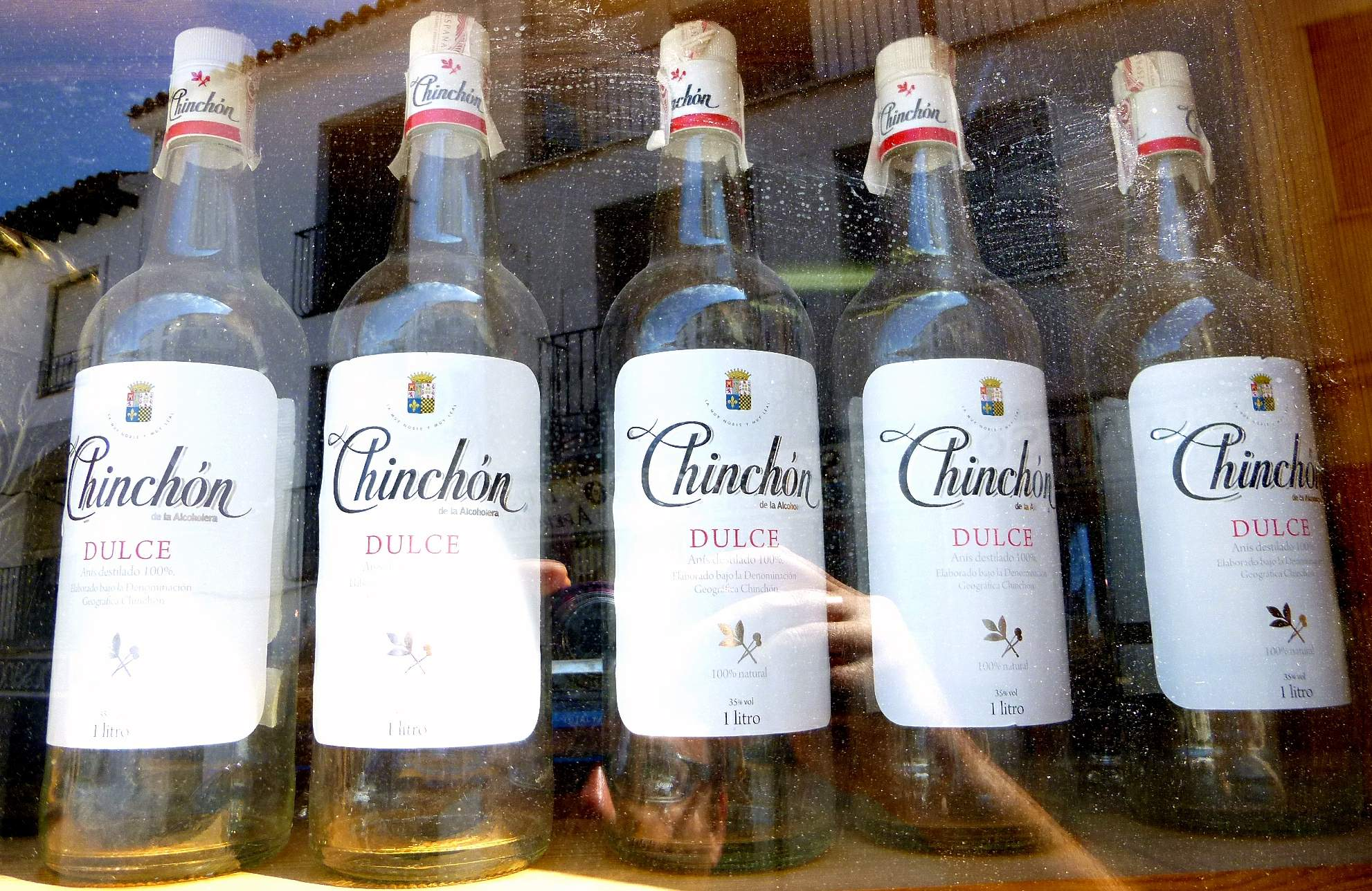 Anís de Chinchón (Madrid)